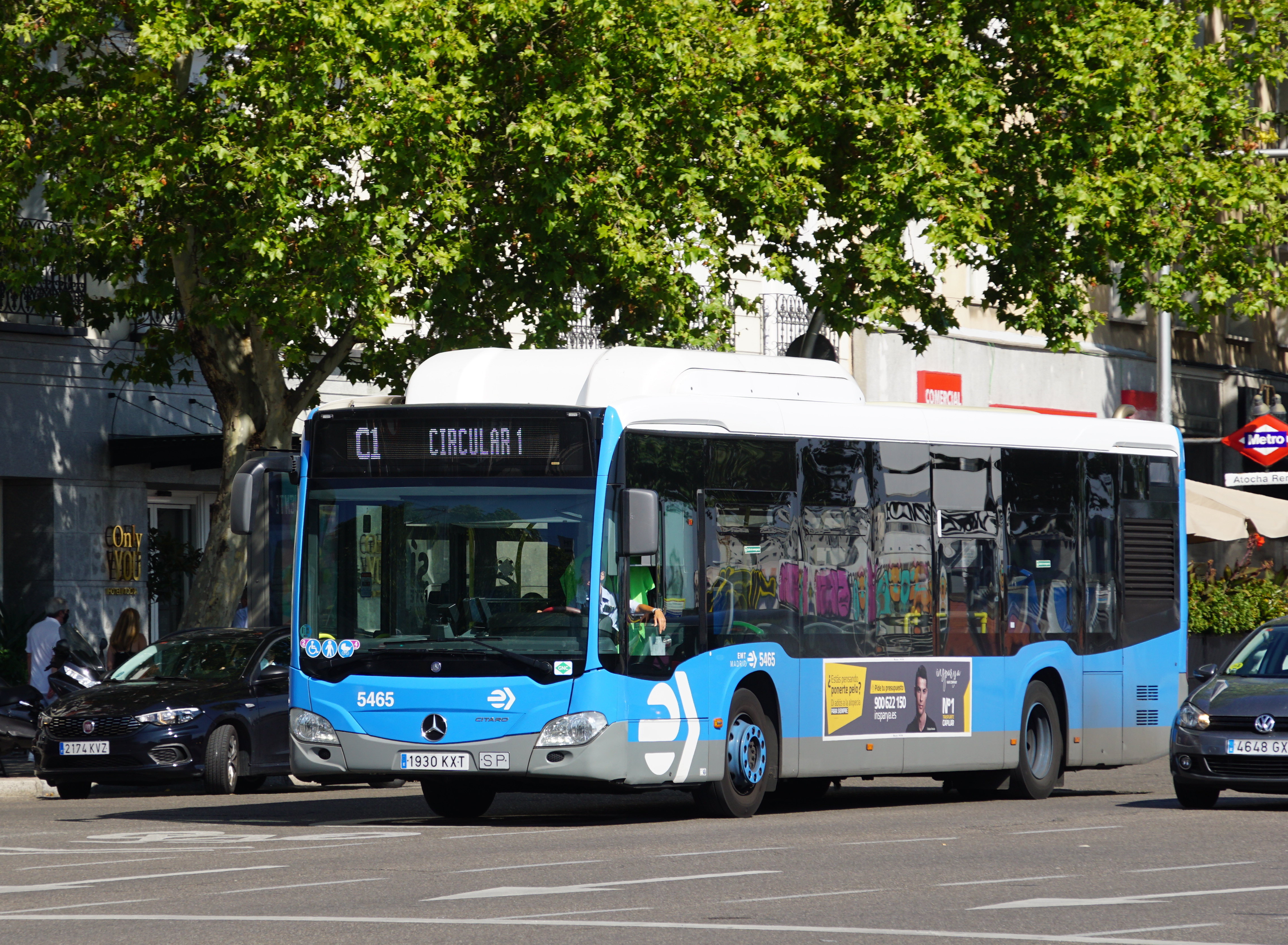 C1 EMT Madrid en la estación de Atocha, agosto 2020